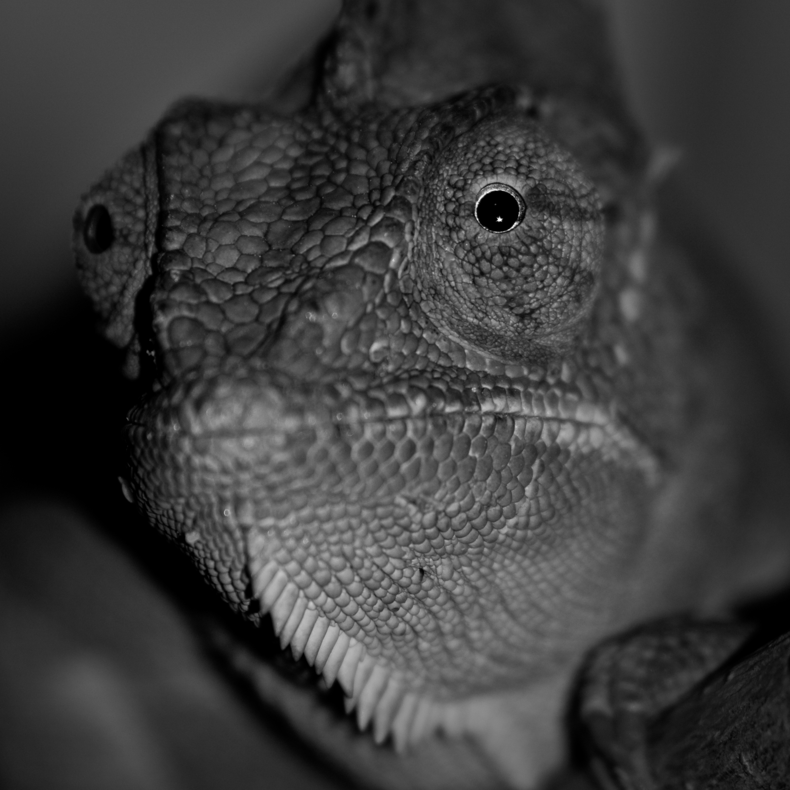 Yemen's chameleon at Marwell Zoo